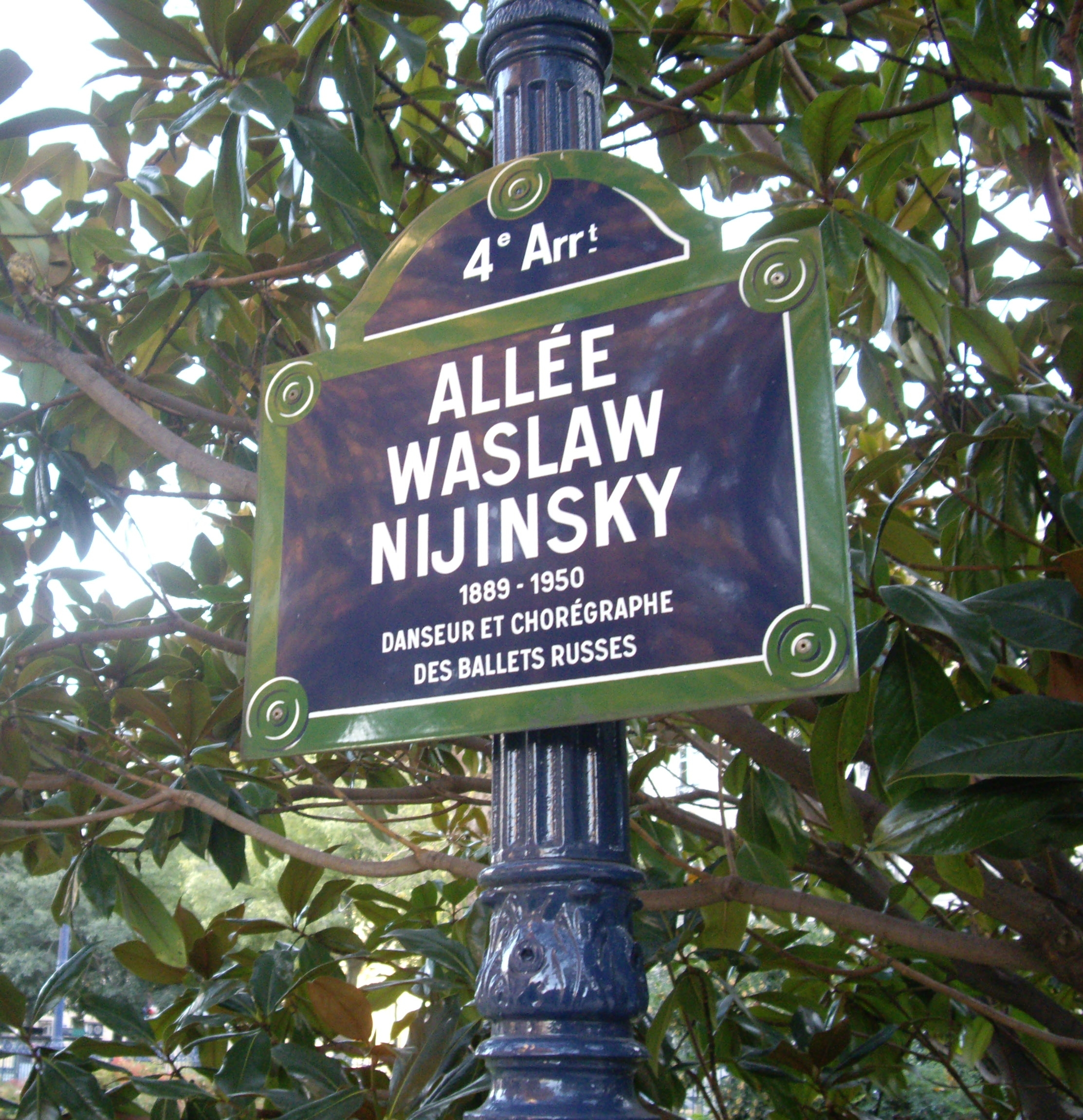 Allée Waslaw Nijinsky, square de la tour Saint-Jacques, Paris 4e. « Waslaw Nijinsky, 1889-1950, danseur et chorégraphe des Ballets russes. »Note : L'allée Waslaw Nijinsky ne fait pas partie de la nomenclature officielle des voies de Paris.